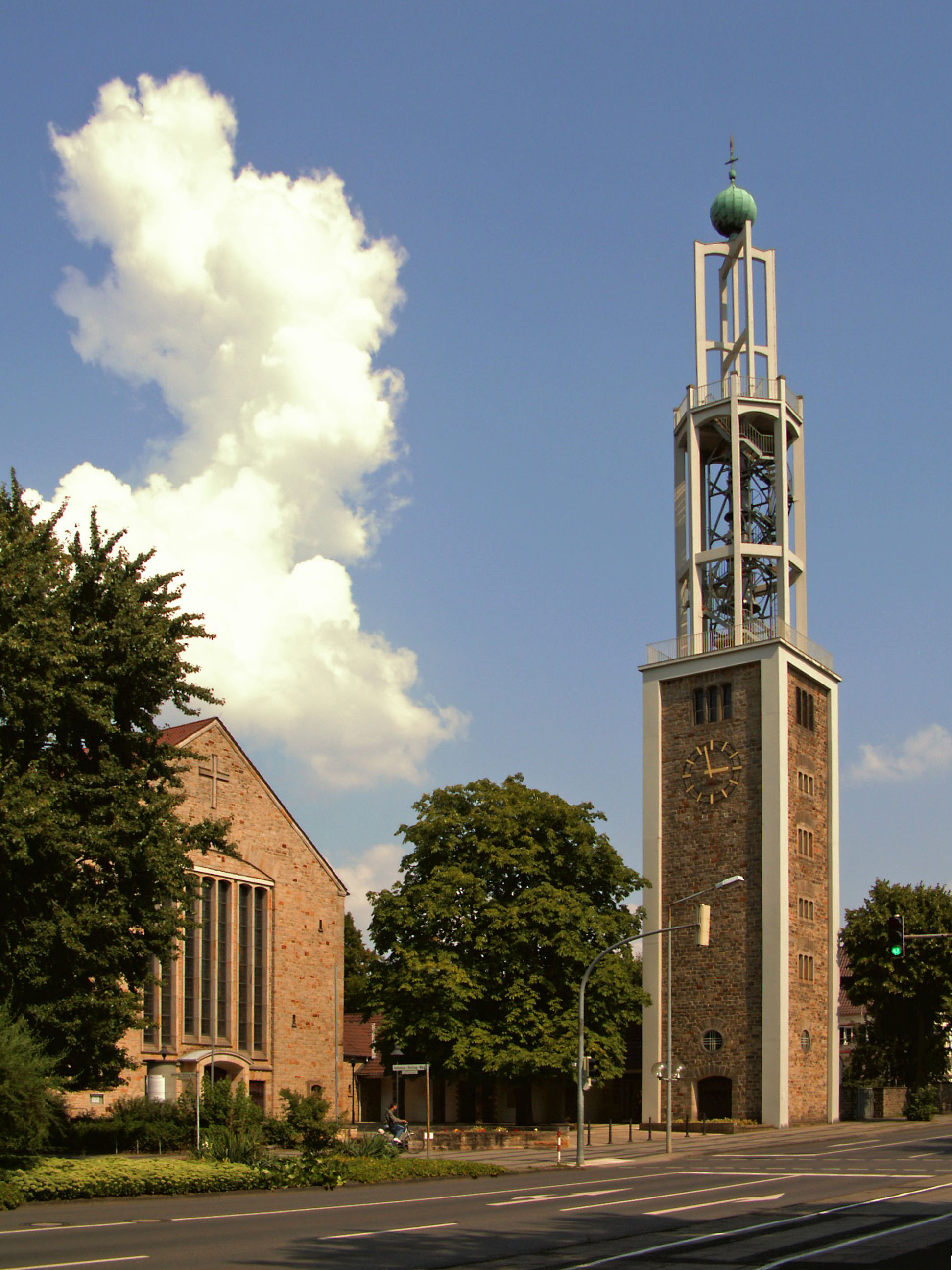 Katholische Kirche St. Christophorus in Wolfsburg